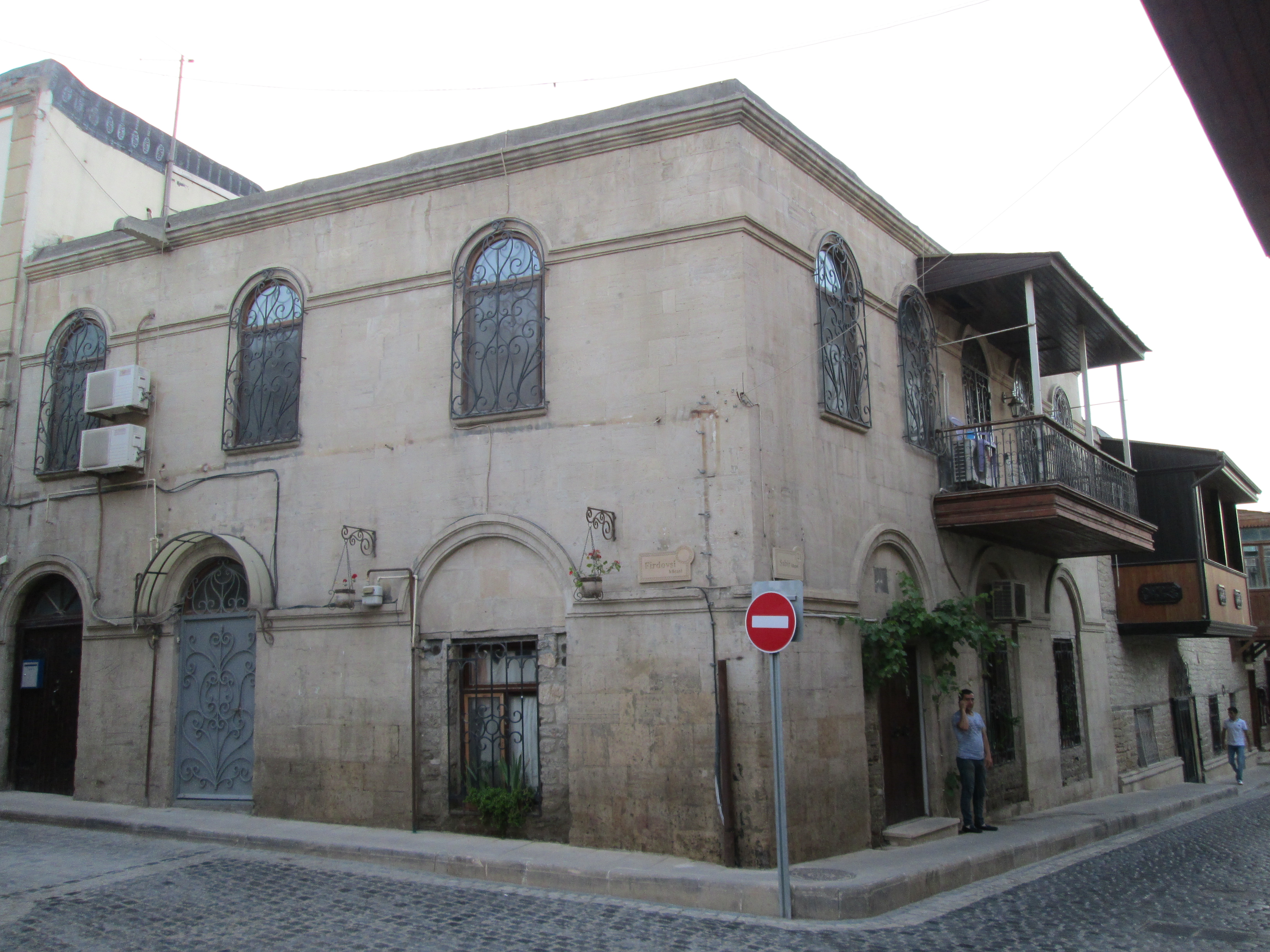 Sabir 21